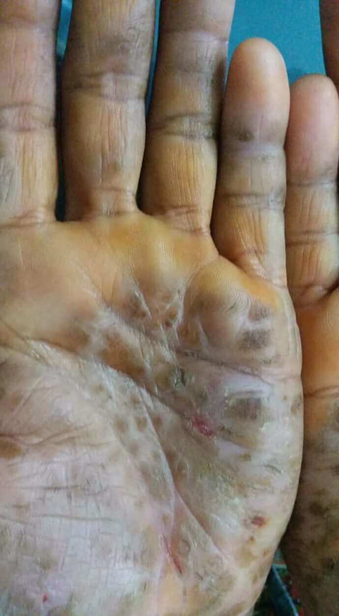 Description clinique Une kératodermie palmoplantaire diffuse (voir ce terme) avec des plaques érythémateuses se développe entre la première et la quatrième année de vie, les plantes des pieds étant généralement plus sévèrement atteintes que les paumes des mains. Une hyperkératose psoriasiforme peut déborder sur les faces dorsales des mains et des pieds (expansion transgrédiente), et, de manière moins fréquente, des lésions peuvent être observées au niveau des membres (genoux, coudes). Les lésions cutanées sont suivies par une gingivite intense évoluant rapidement en parodontite avec alvéolyse et perte précoce de la dentition primaire. Les lésions cutanées sont aggravées par le froid et par les épisodes de sévère parodontite. Pendant l'enfance, la parodontite réapparaît, résultant en une perte rapide de la dentition définitive. Des cas de SPL avec une maladie parodontale légère et/ou tardive ont été rapportés de manière occasionnelle. Ce symptôme s'accompagne dans la moitié des cas d'une susceptibilité accrue aux infections cutanées et systémiques (furonculose, abcès cutanés, pyodermite, hidradénite suppurée (voir ce terme), infection des voies respiratoires...). Les patients peuvent aussi présenter une hyperhidrose malodorante, une hyperkératose folliculaire, une dystrophie unguéale ou des calcifications durales. L'association du SPL avec un mélanome malin ou un cancer épidermoïde a été rapportée dans de rares cas.